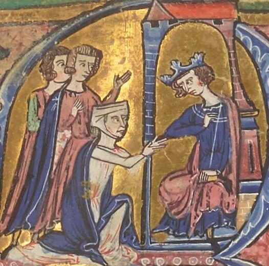 Foulque de Jérusalem et Cécile